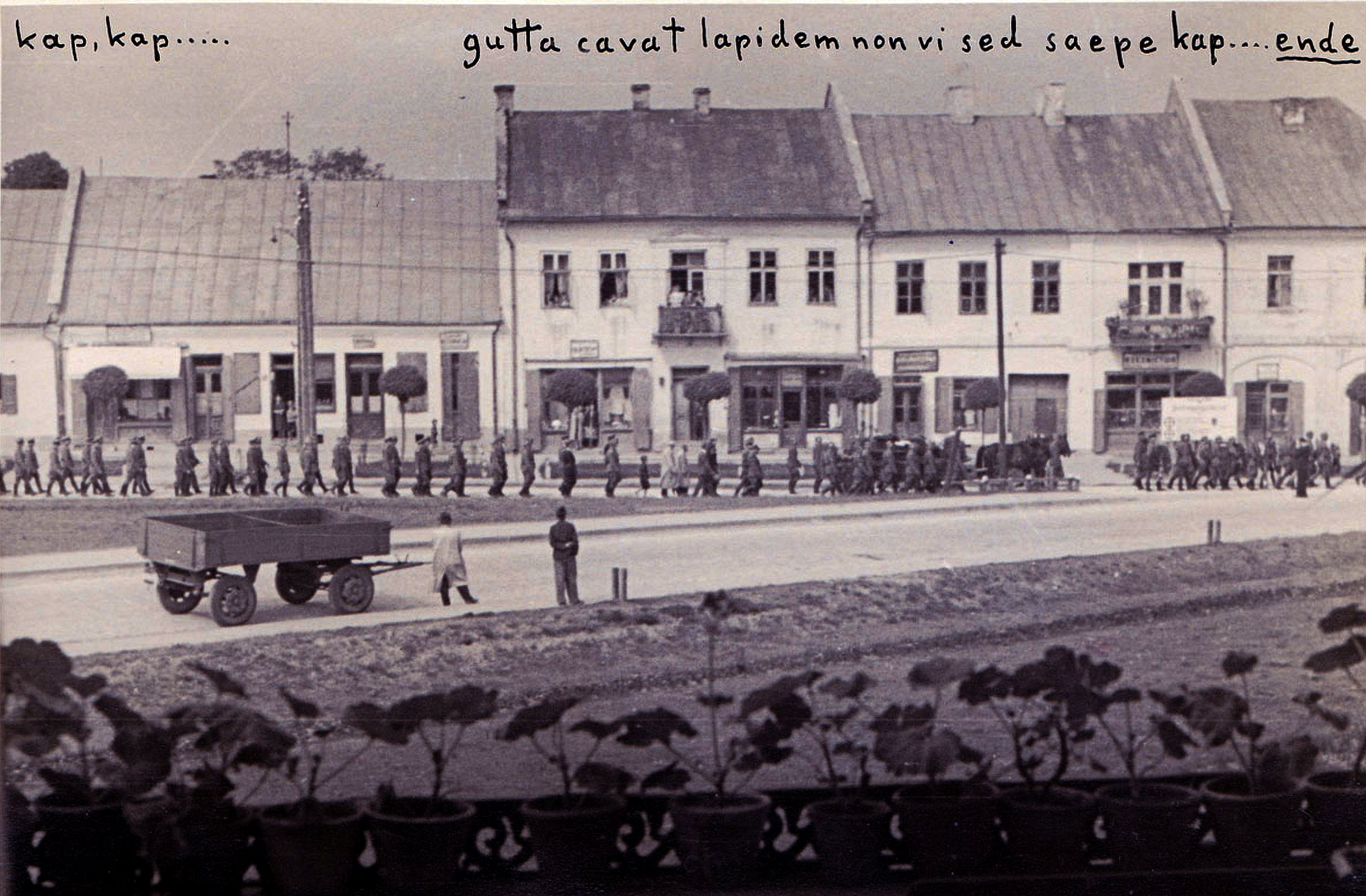 Jędrzejów. Rynek, pogrzeb Helmuta Kappa